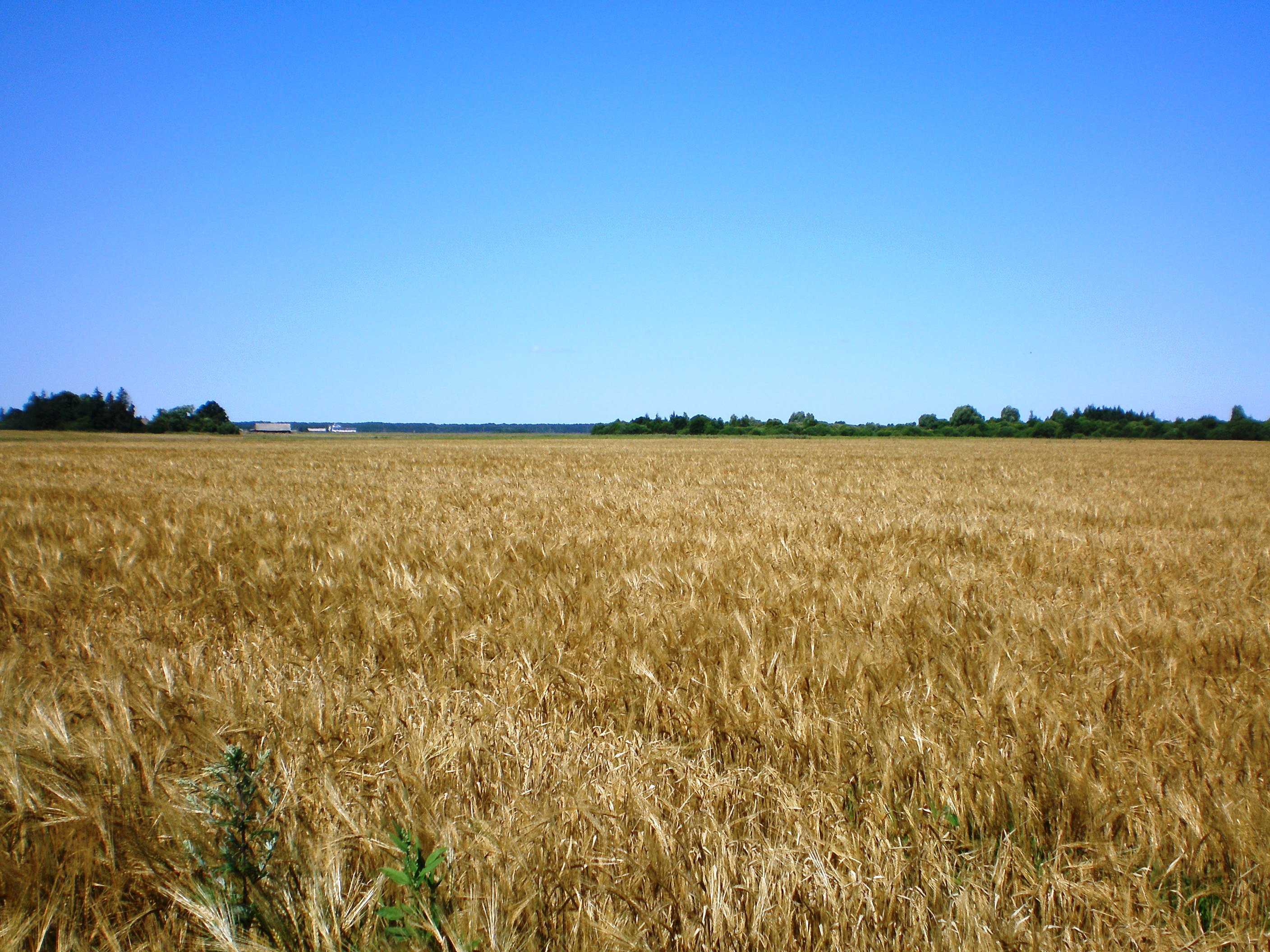 Hordeum vulgare